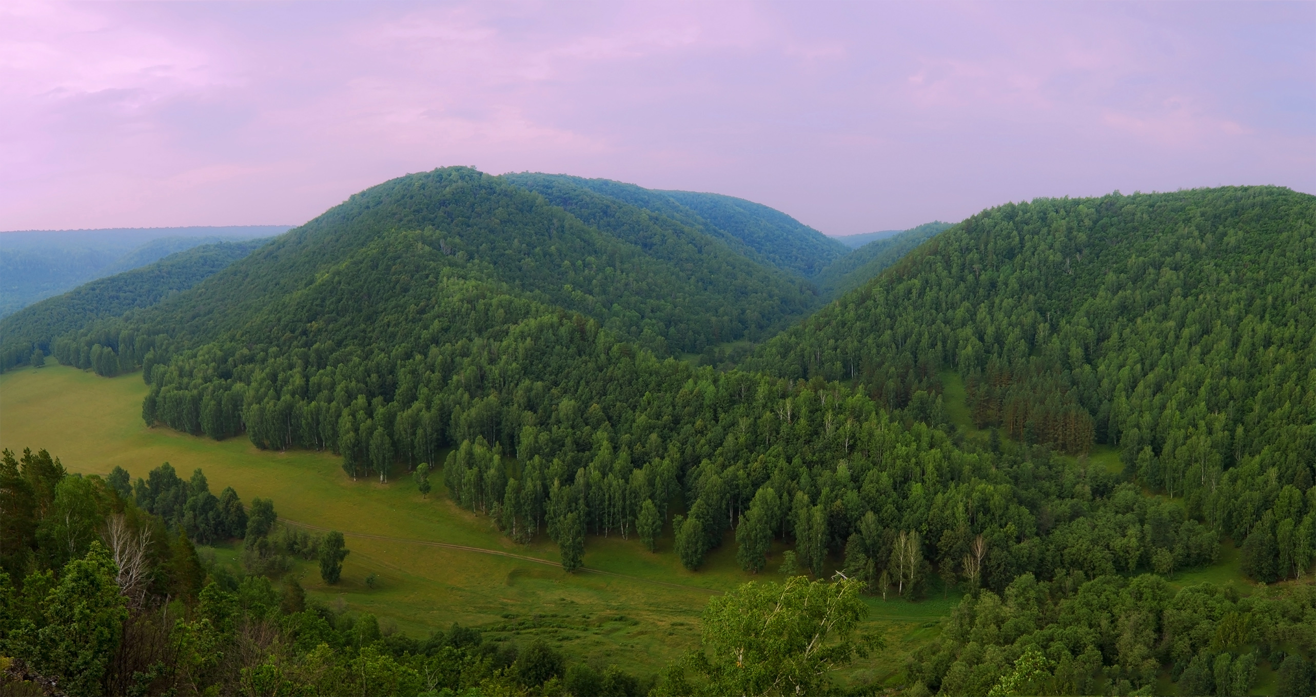 урочище Курьясворт, Ишимбайский район, Башкортостан, Россия